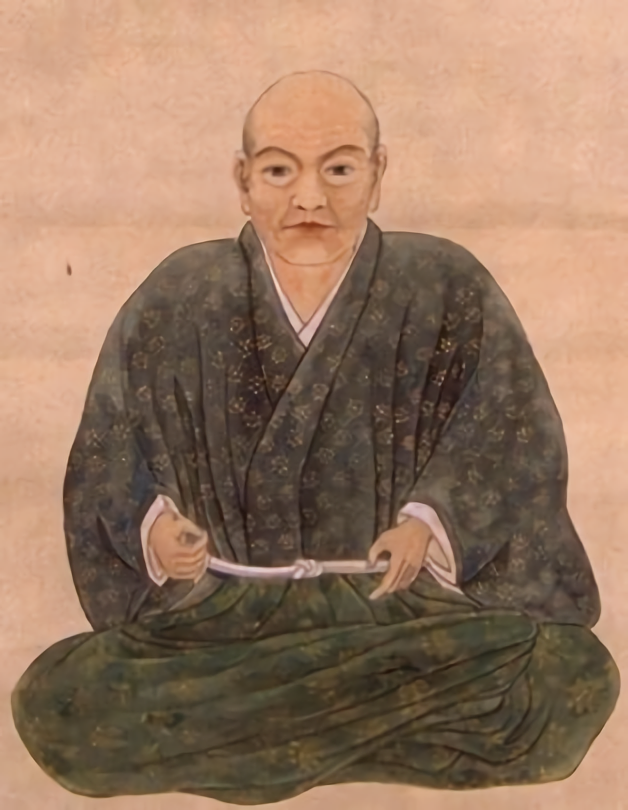 蘆名盛氏肖像画